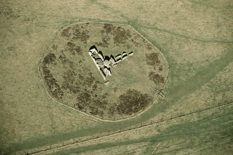 Stenkammargraven / gånggriften Girommen RAÄnr Hornborga 22:1. Motiv: Ekornavallen Nyckelord: Flygbilder, Riksintressen Kategori: Gravfält, Stenkammargrav Stenkammargraven / gånggriften Girommen RAÄnr Hornborga 22:1.